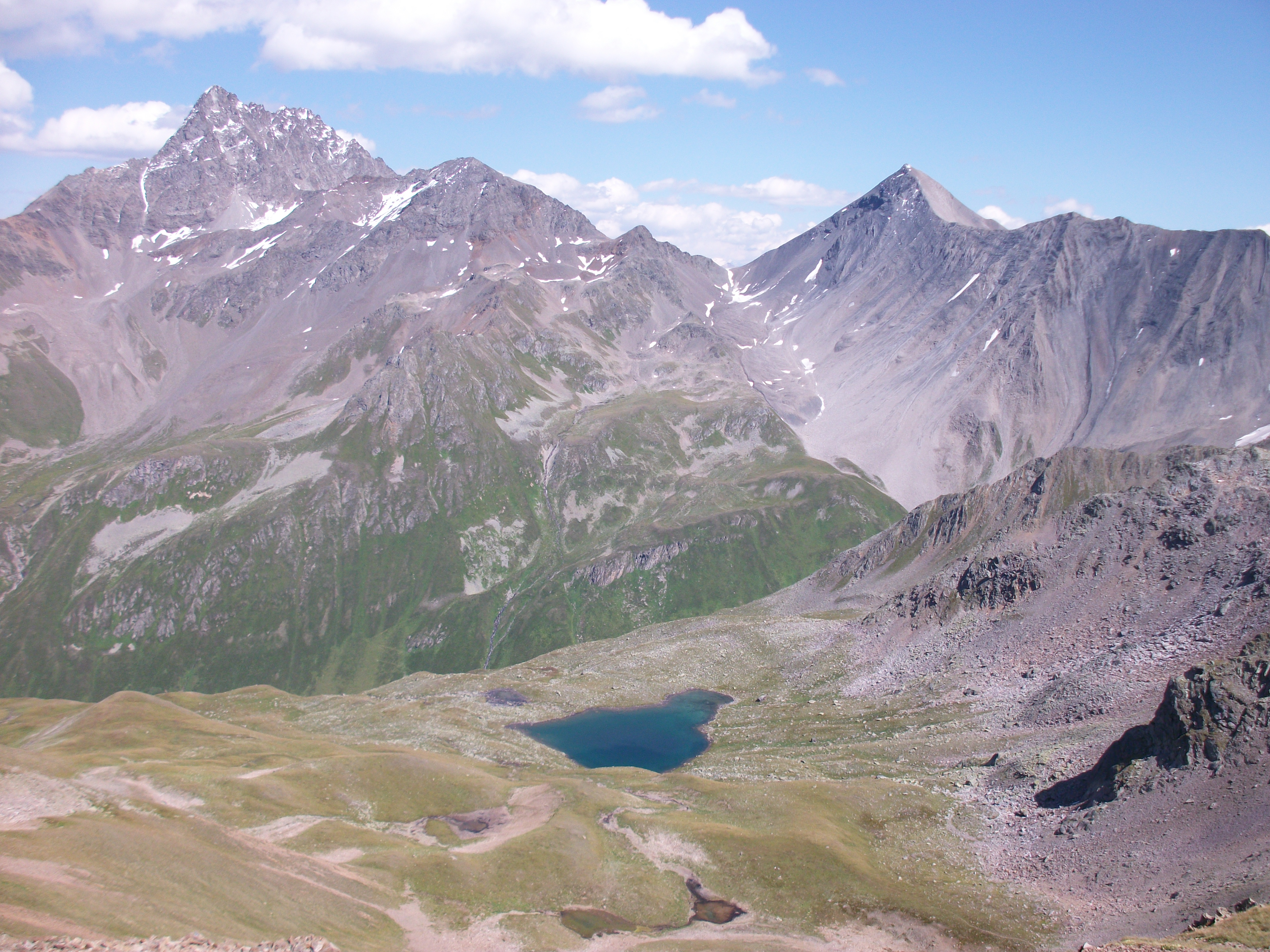 Piz Kesch, Piz Pischa, Piz As-cha, Fuorcla Pischa, Piz Blaisun, Murtel da Lai